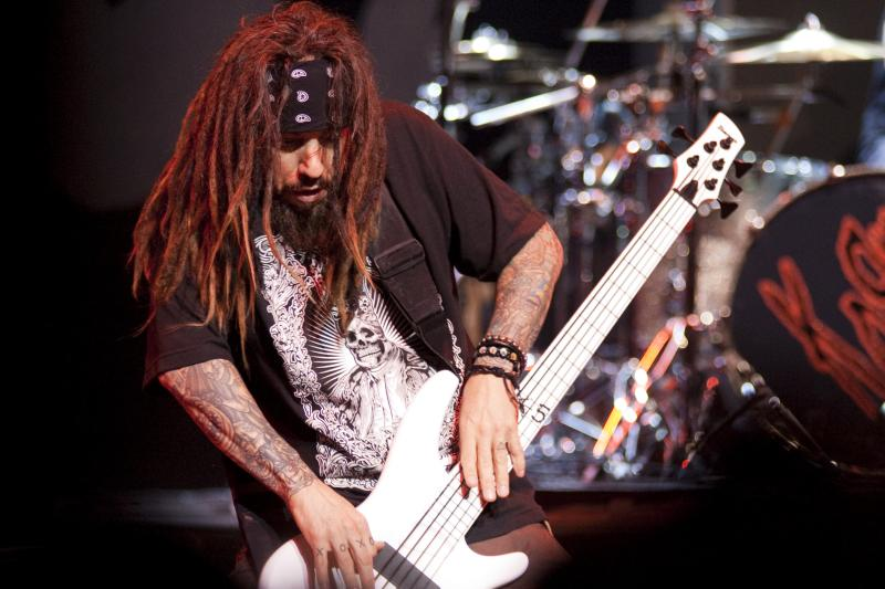 Korn Live @ Credicard Hall - 21/04/2010 - São Paulo, Brasil É proibida a cópia ou reprodução deste material sem a autorização do autor. Por favor, não publique nada daqui sem o devido crédito. Fotógrafo: Alexandre Cardoso